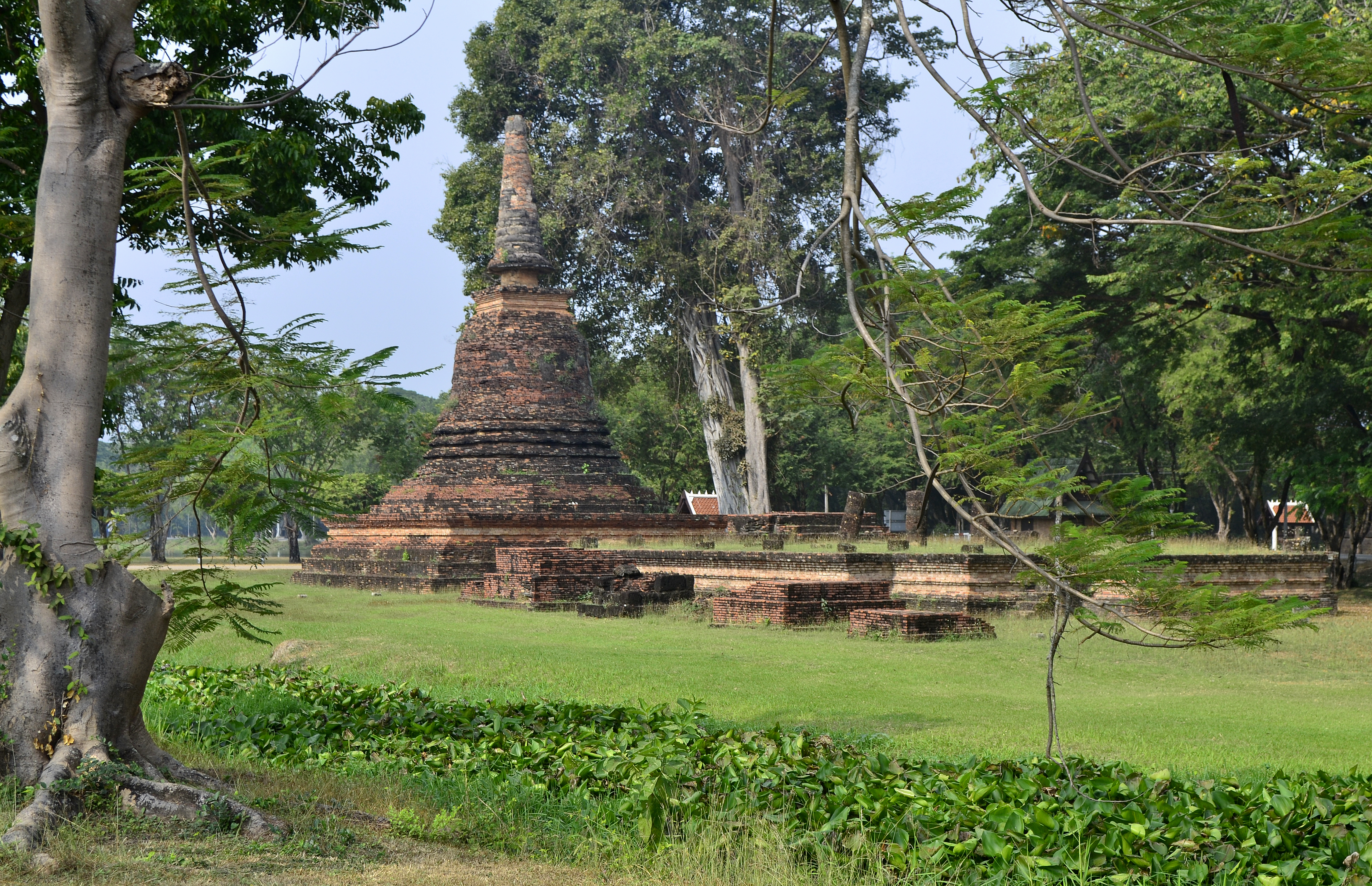 Wat Tra Kuan, Sukhothai